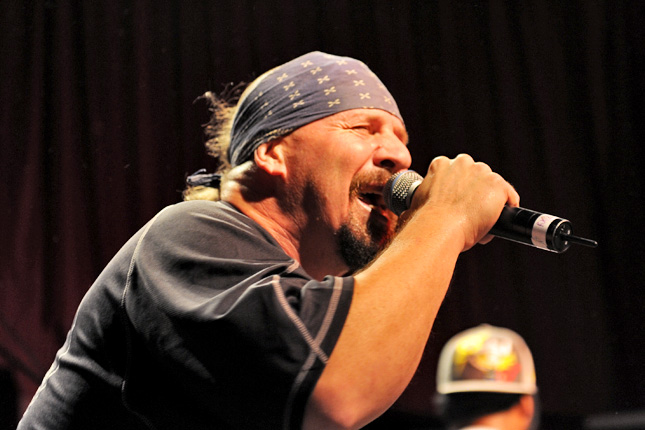 Suicidal Tendencies @ Capitol (18/5/2011)